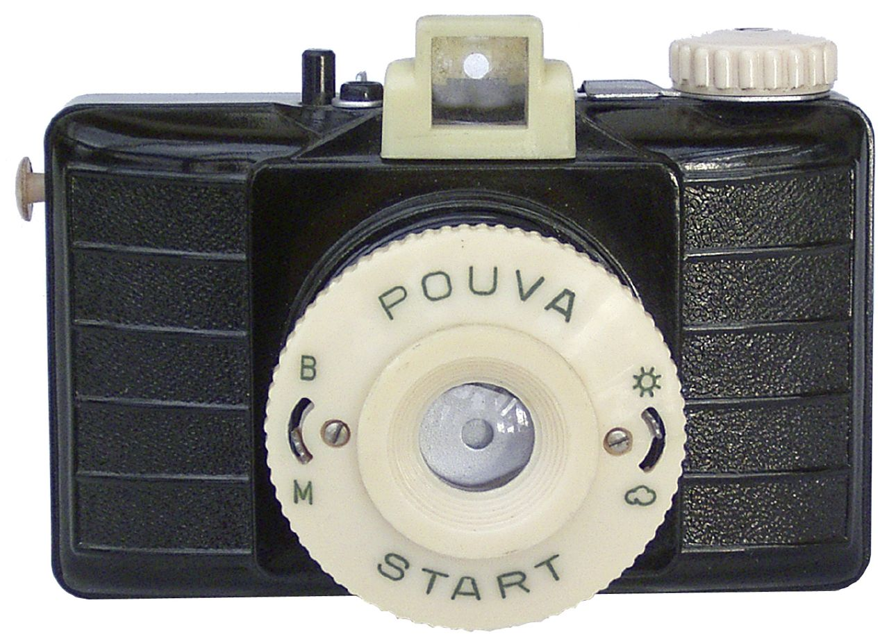 Die Pouva Start war eine der erfolgreichsten, wenn nicht die erfolgreichste Kamera der DDR. Von 1951 bis 1972 sollen über 1,7 Mio. Stück hergestellt worden sein! Produzent war die Karl Pouva KG, Freital, 1972 verstaatlicht. Die Pouva Start war eine einfache, aber gut gestylte Kunststoff-Rollfilm-Kamera, mit einer Moment-Zeit und B, dazu 2 Blenden (Sonne und Wolken). Die ersten Modelle hatten einen Klappsucher, die späteren (wie meine) einen Durchsichtssucher. Das Objektiv war ein Duplar 1:8 und wurde zum Gebrauch herausgezogen. Der Preis von 16,50 Mark trug auch dazu bei, dass es die Kamera für die Jugend wurde. Es gab Exportmodelle und Lizenzproduktionen, z. B. in Indien und Polen. Die westdeutsche Firma HAMA hatte großen Erfolg mit ihren Lizenz-Produkten Hexi, Moni, P56.